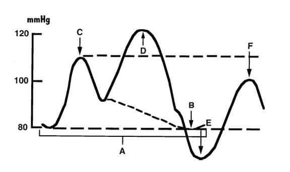 Ballondruckkurve